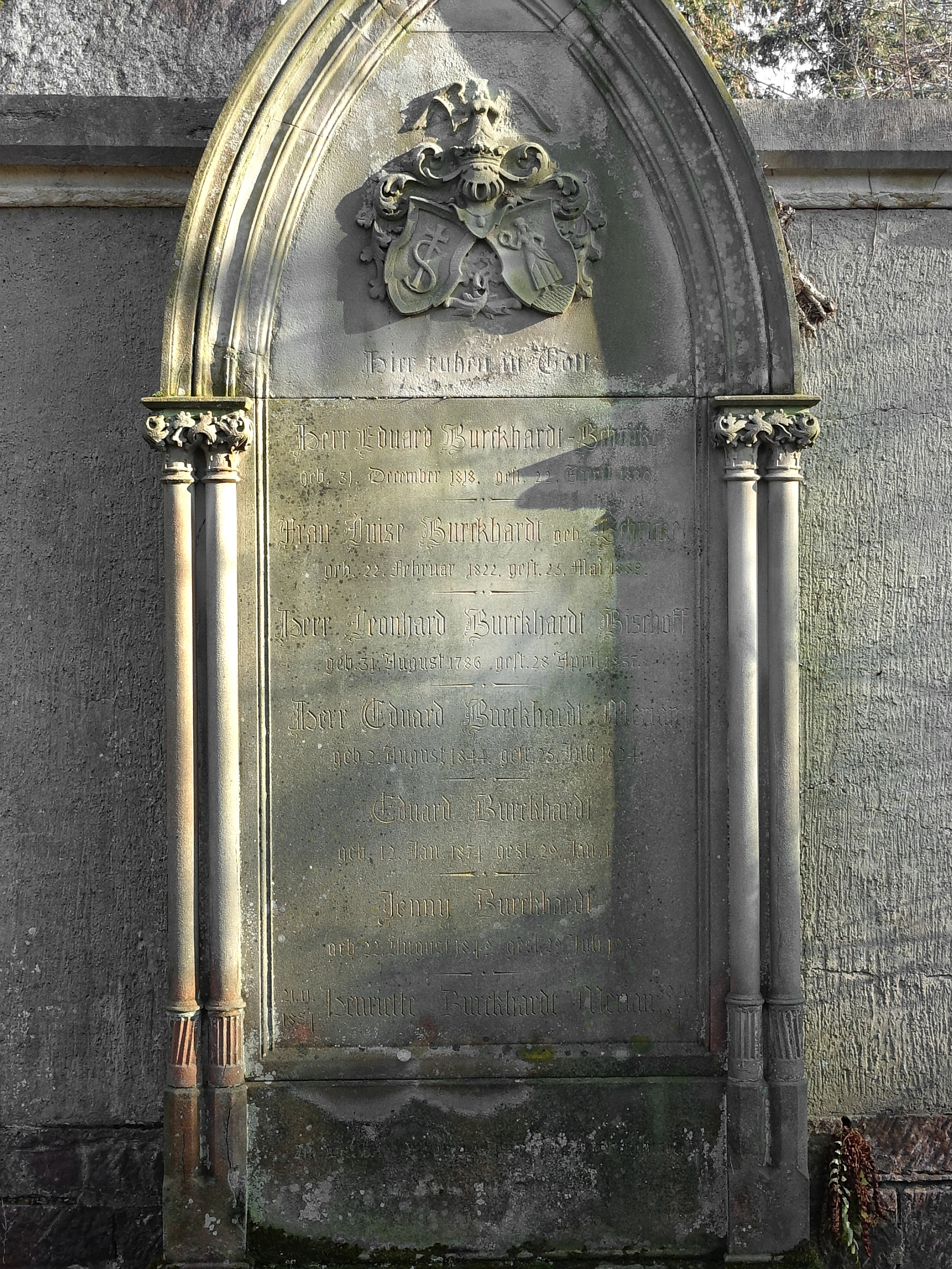 Jenny Burckhardt (1849–1935) Malerin. Familiengrab auf dem Friedhof Wolfgottesacker, Basel.